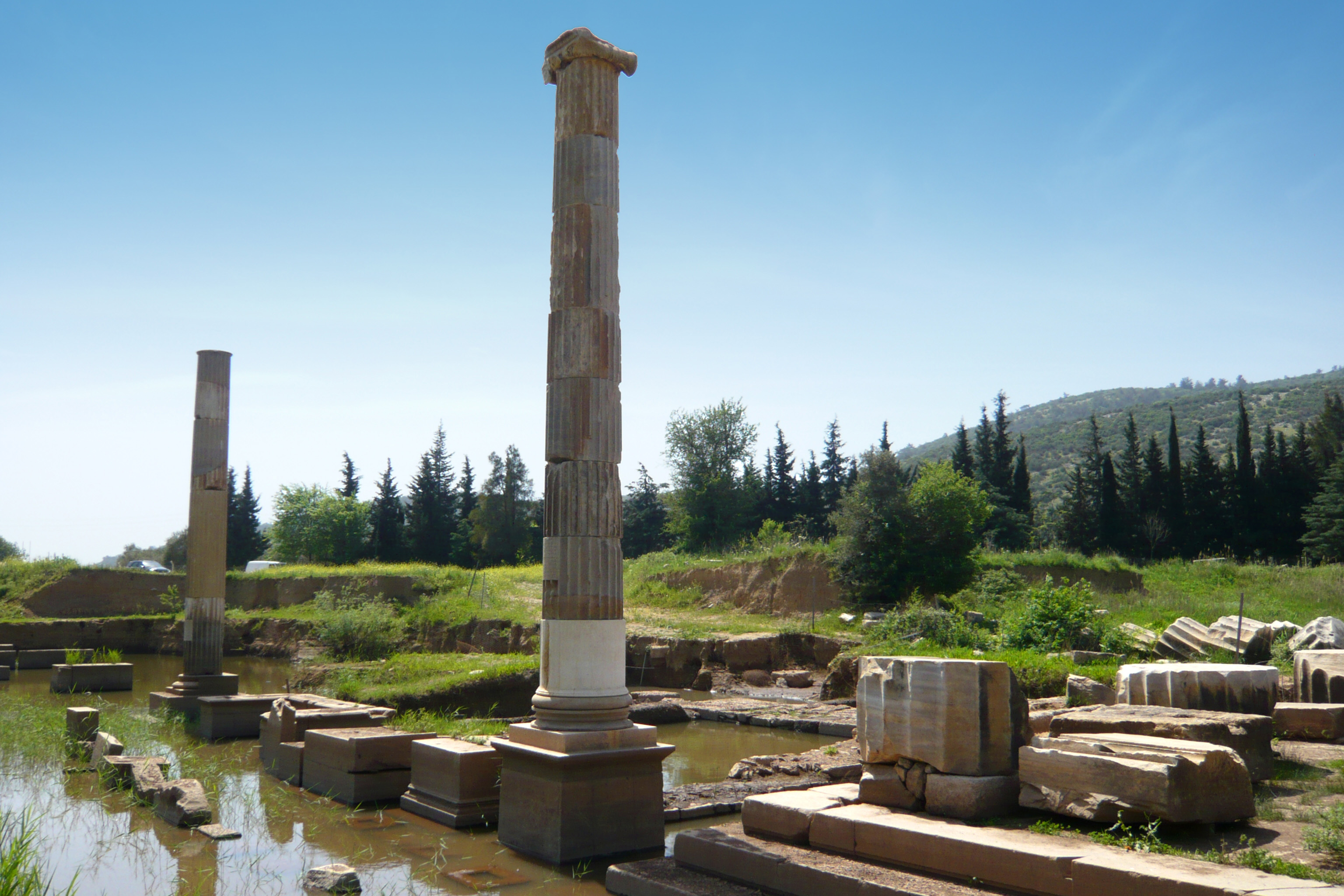 Klaros, Turkey